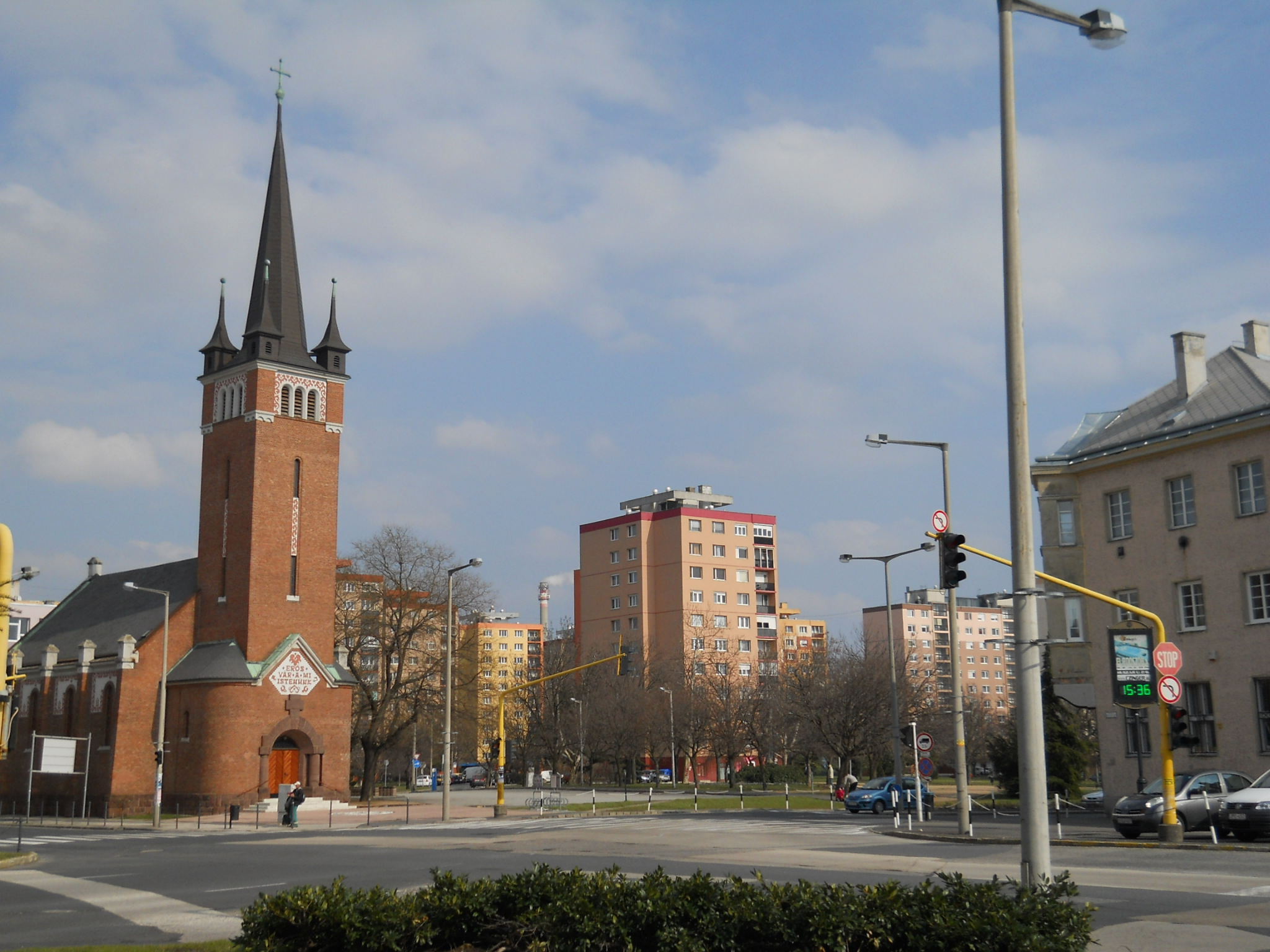 Székesfehérvár - evangélikus templom